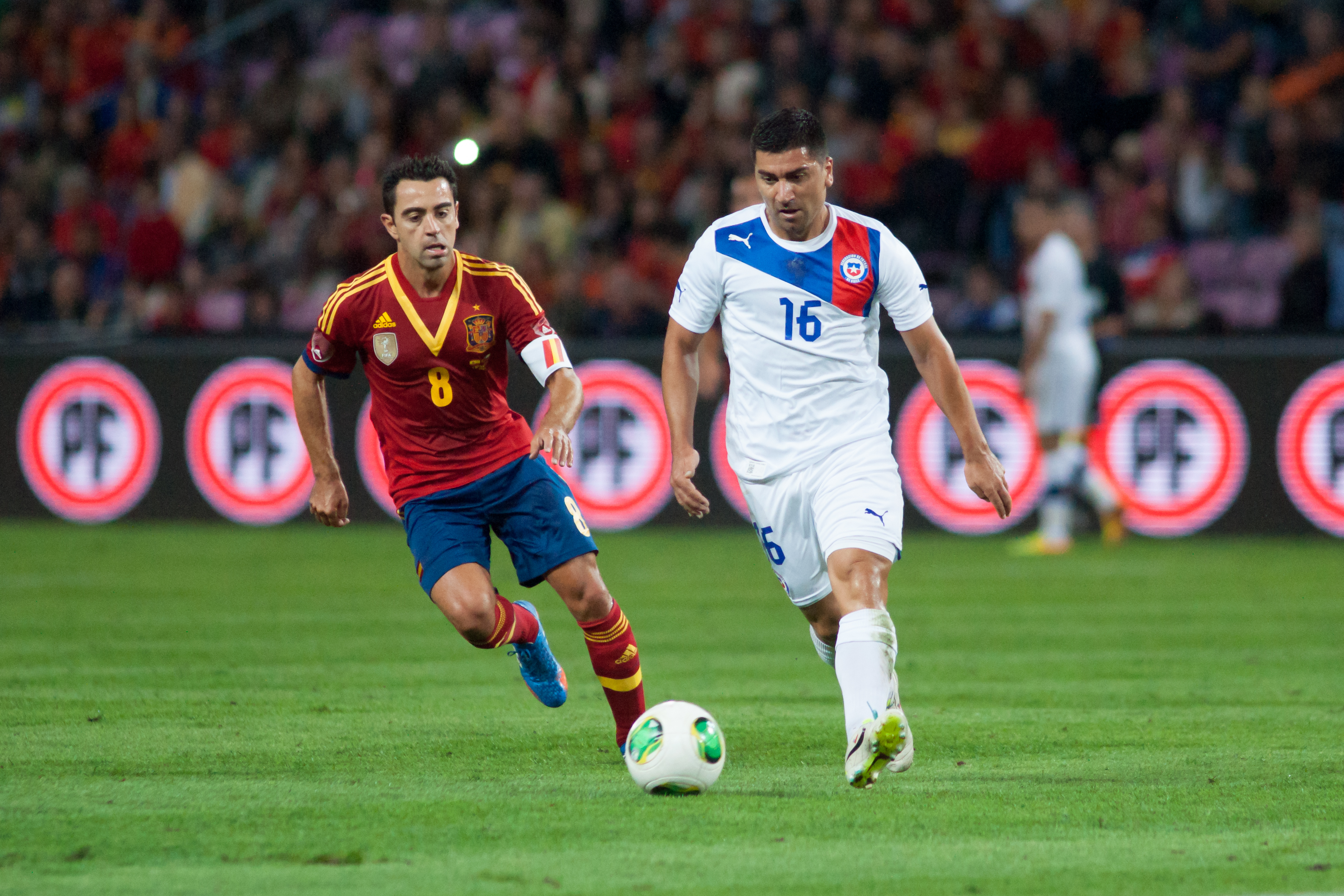 Espagne - Chili, 10 septembre 2013.